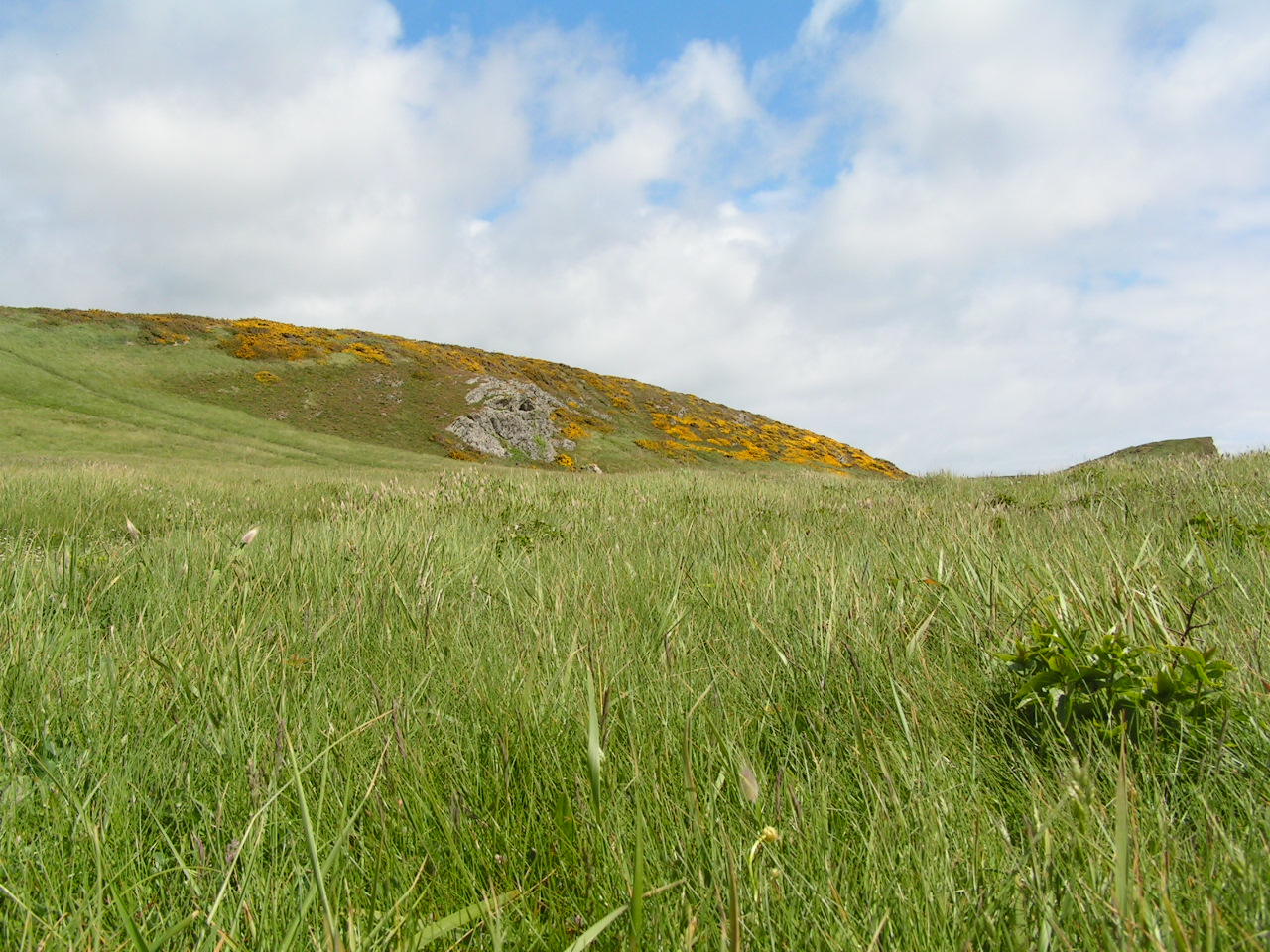 Paysage cotier à Belle Isle en Mer Source: image taken by Gilles RENAULT